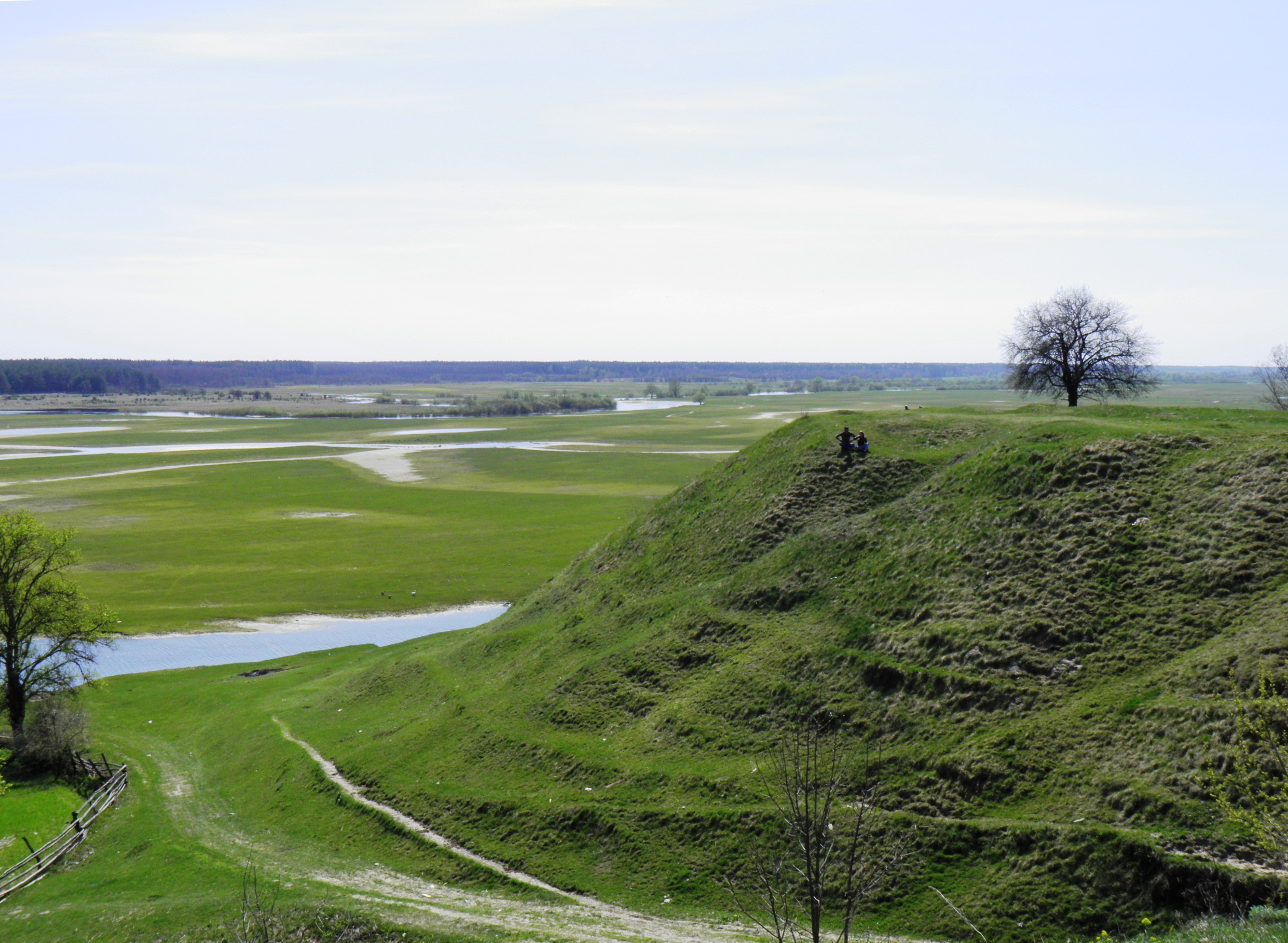 Старий Чарторийськ. Городище